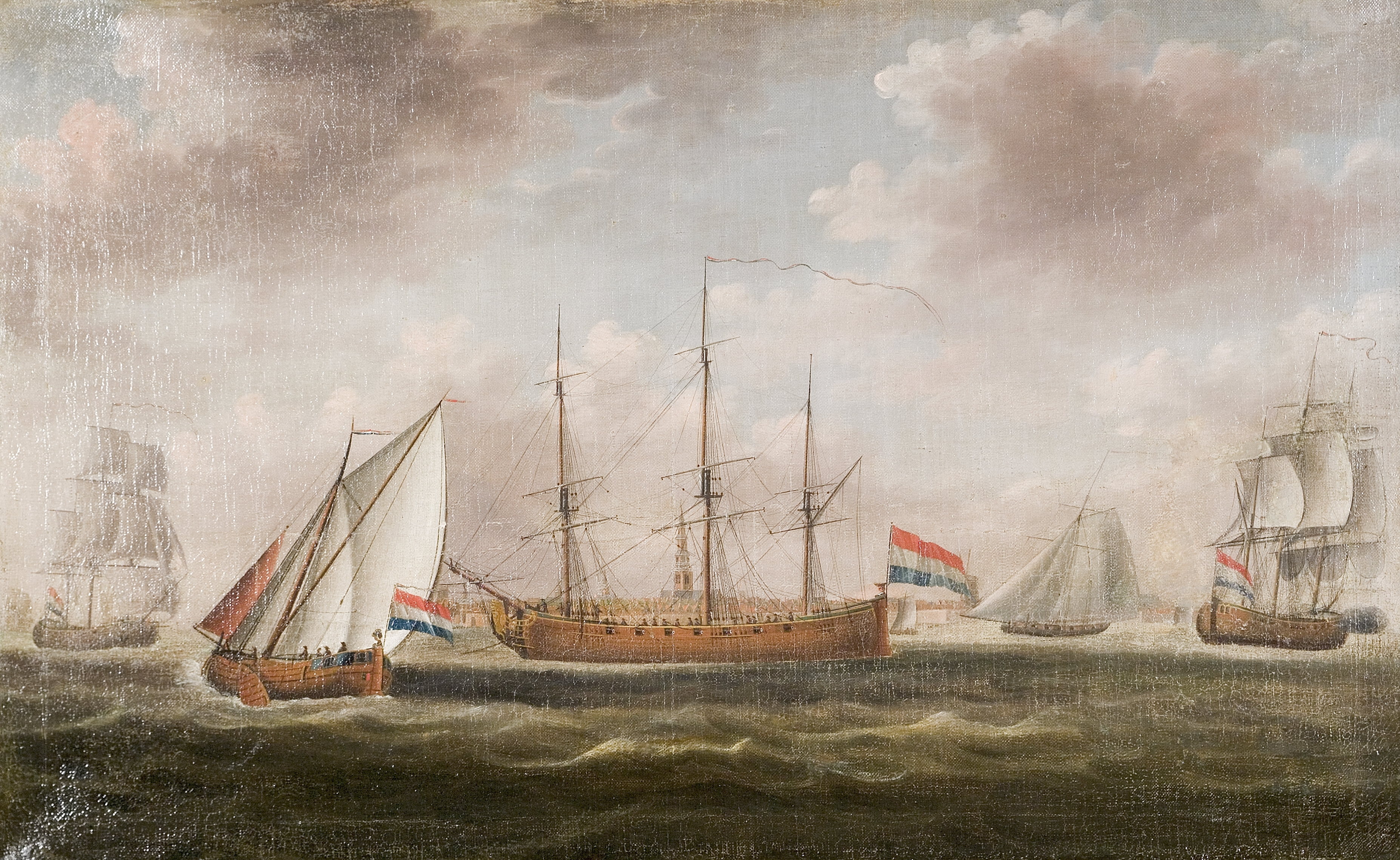 Drie keer dezelfde hoeker met Nederlandse vlag.